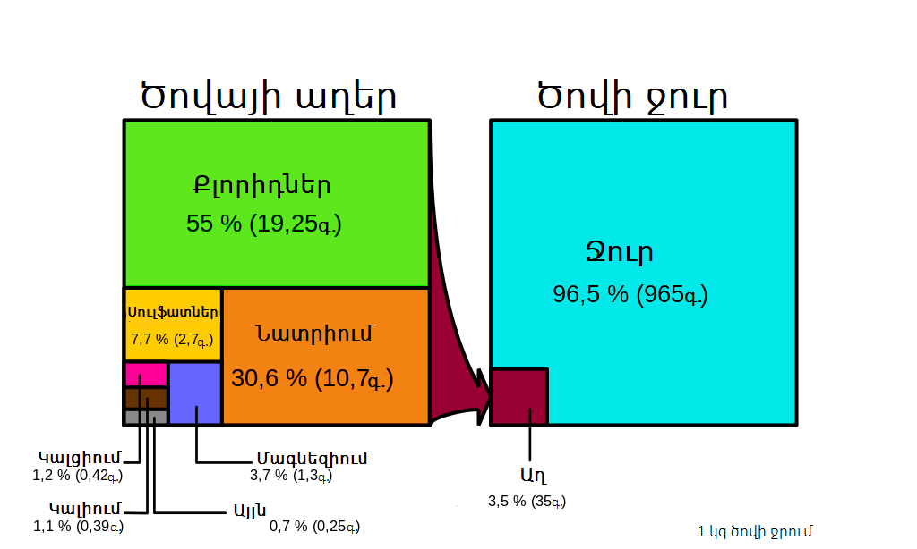 Ծովի ջրի բաղադրությունը